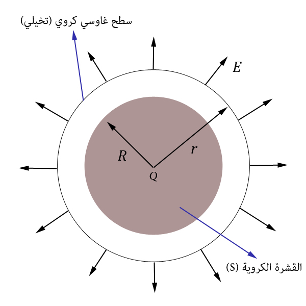 سطح كروي غاوسي داخله يوجد قشرة كروية سحنتها مورزعة بتجانس